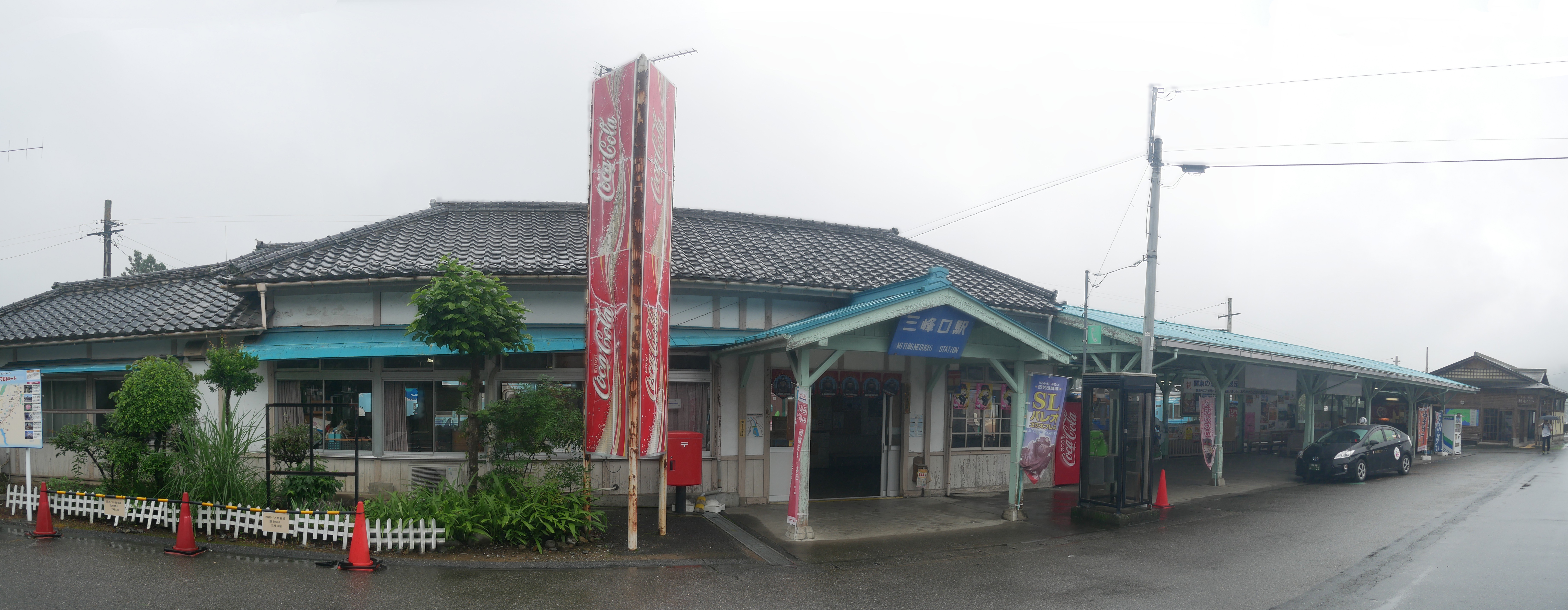 Mitsumineguchi Station (三峰口駅)